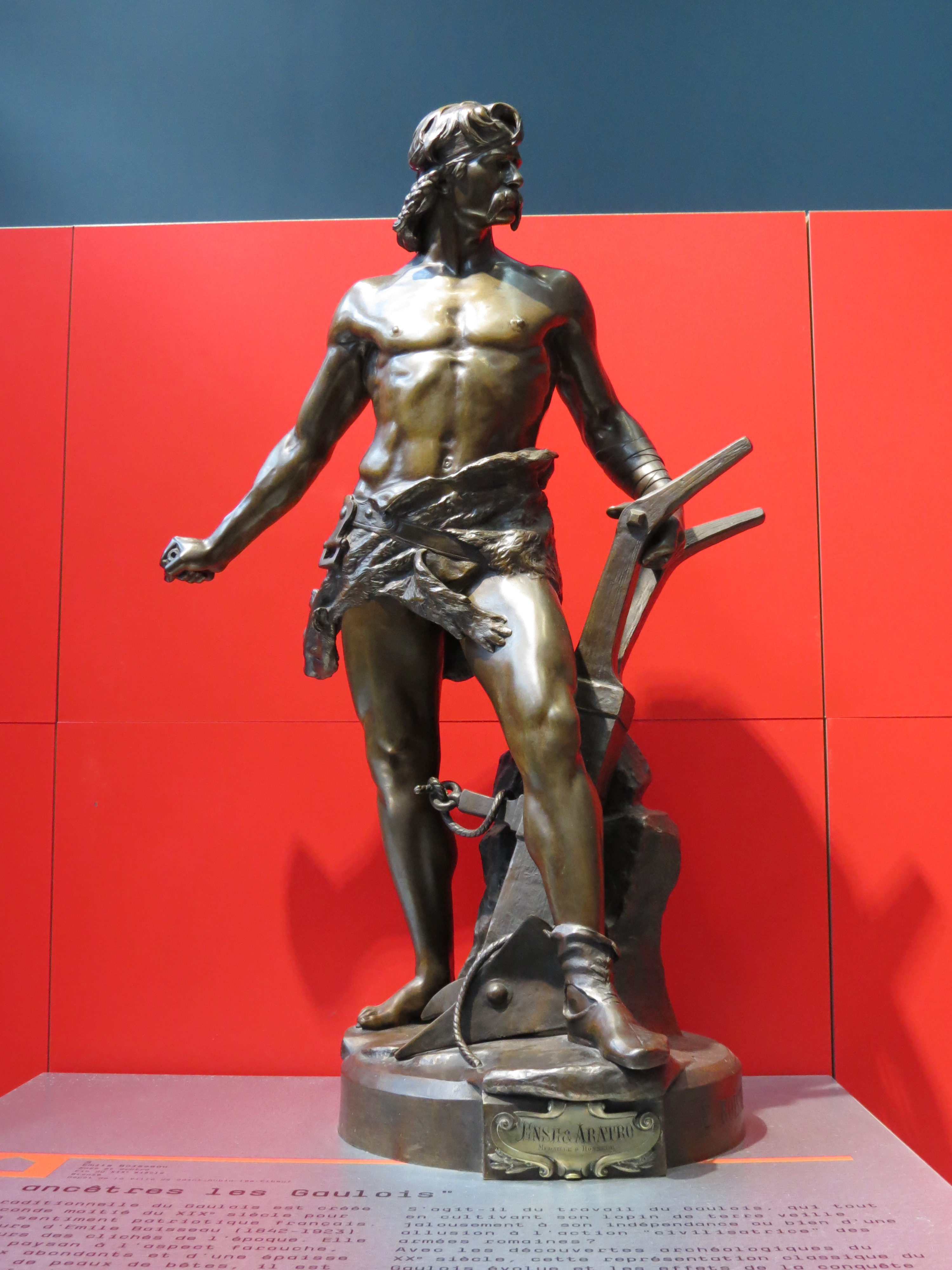 Ense et aratro, bronze de la fin du XIXe par Emile Boisseau.